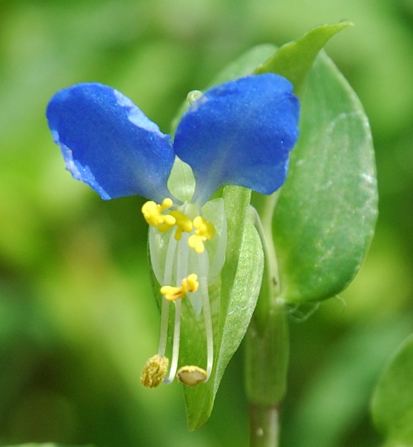 Commelina communis (ツユクサ)